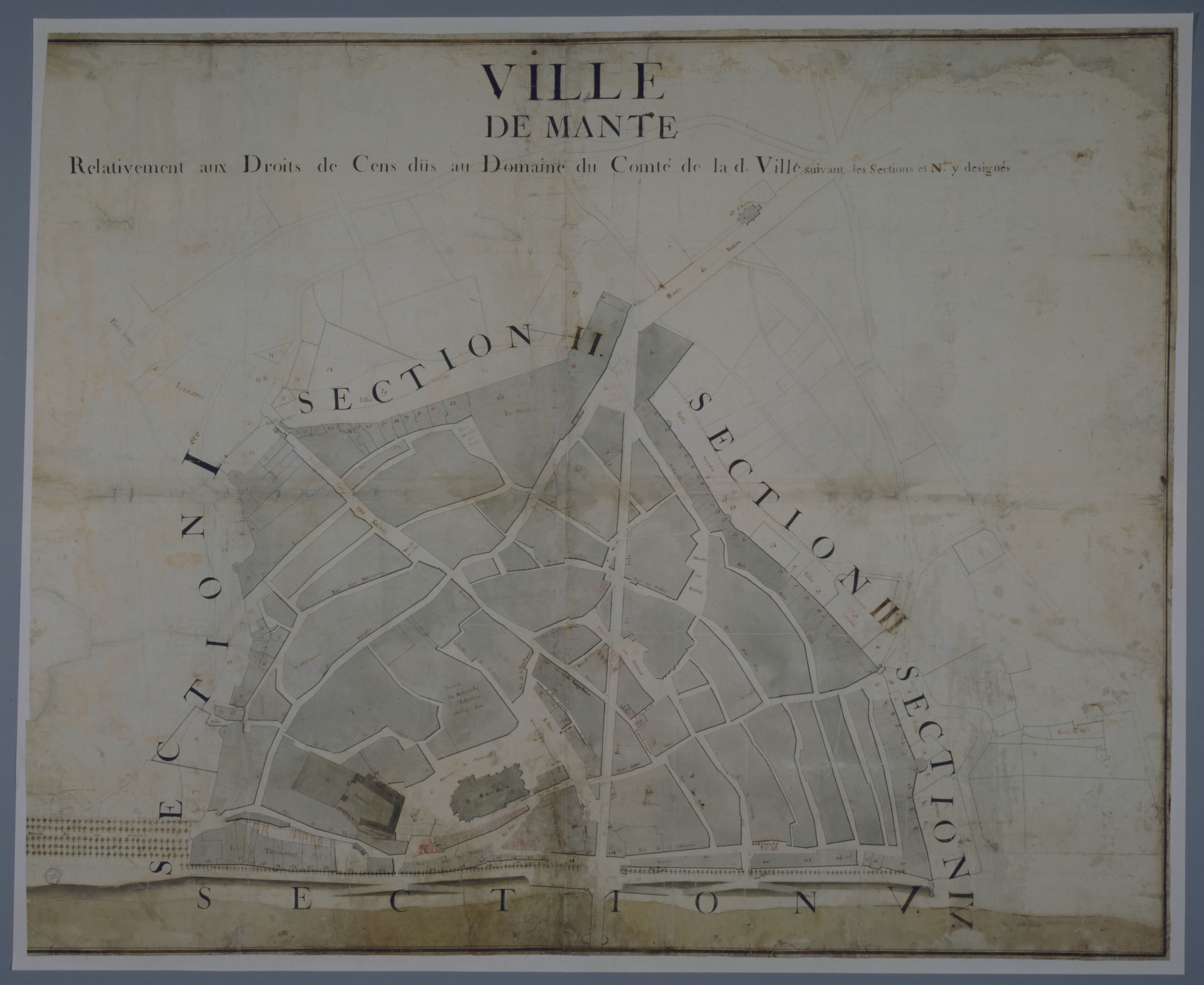 Plan de la ville de Mantes, relativement aux droits de cens qui y sont perçus, XVIIIe siècle.